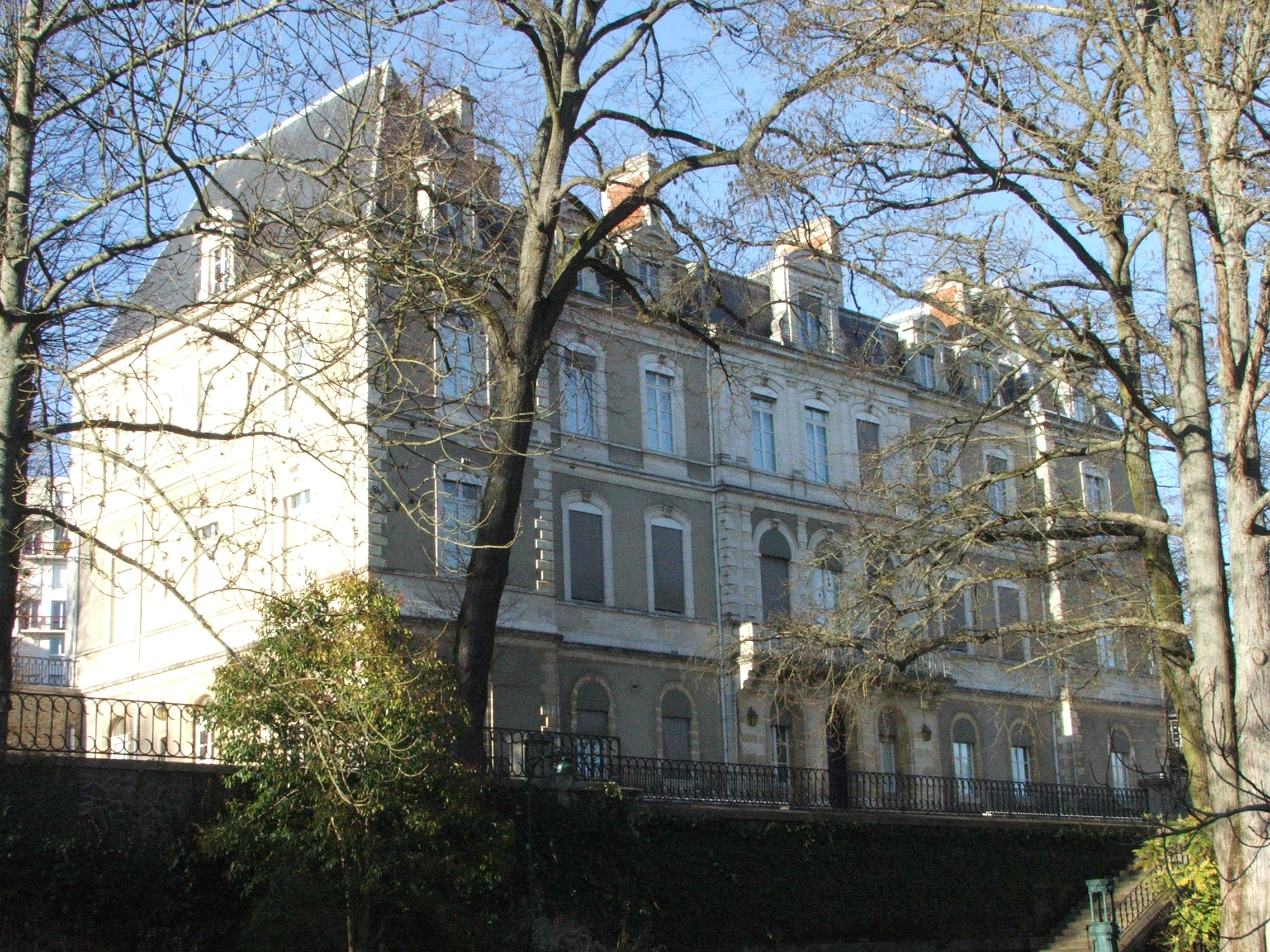 Le Parc de Tessé au Mans